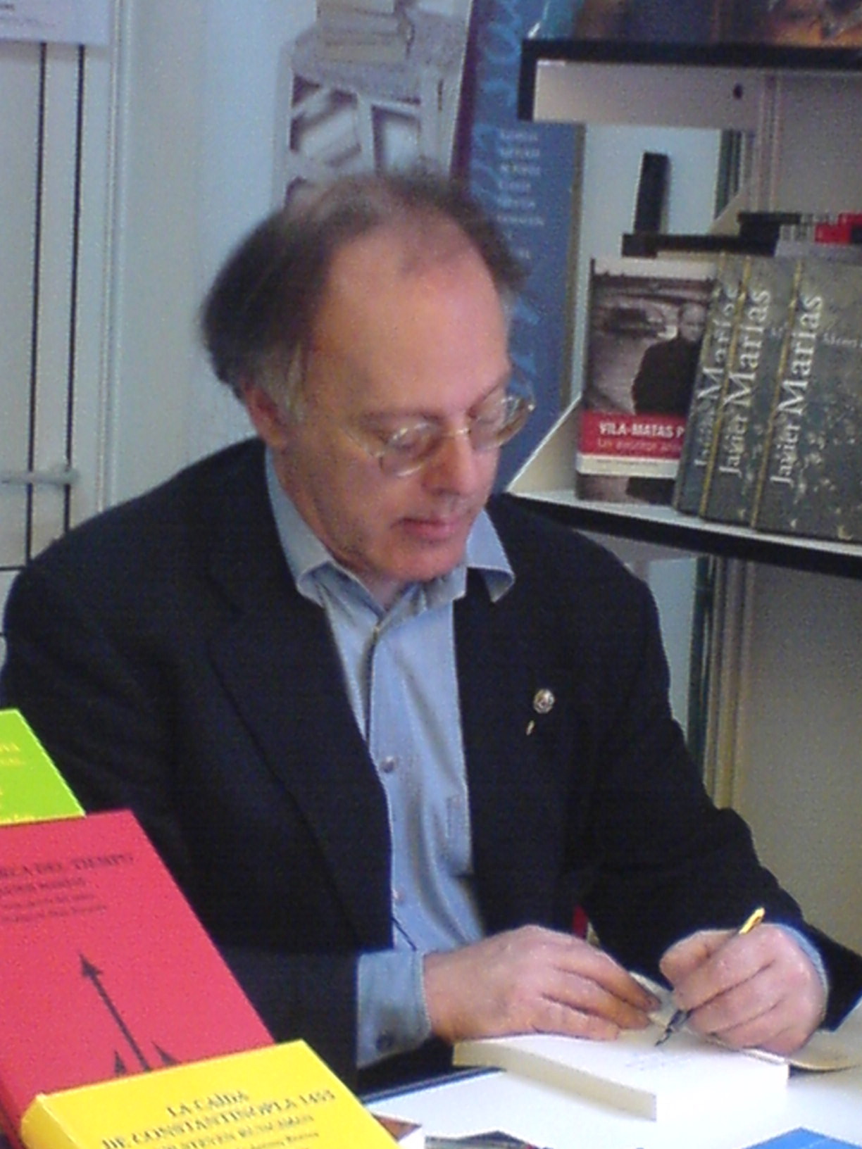 El escritor Javier Marías firmando su último libro en la Feria del Libro de Madrid de 2007. Fotografía hecha con teléfono móvil.